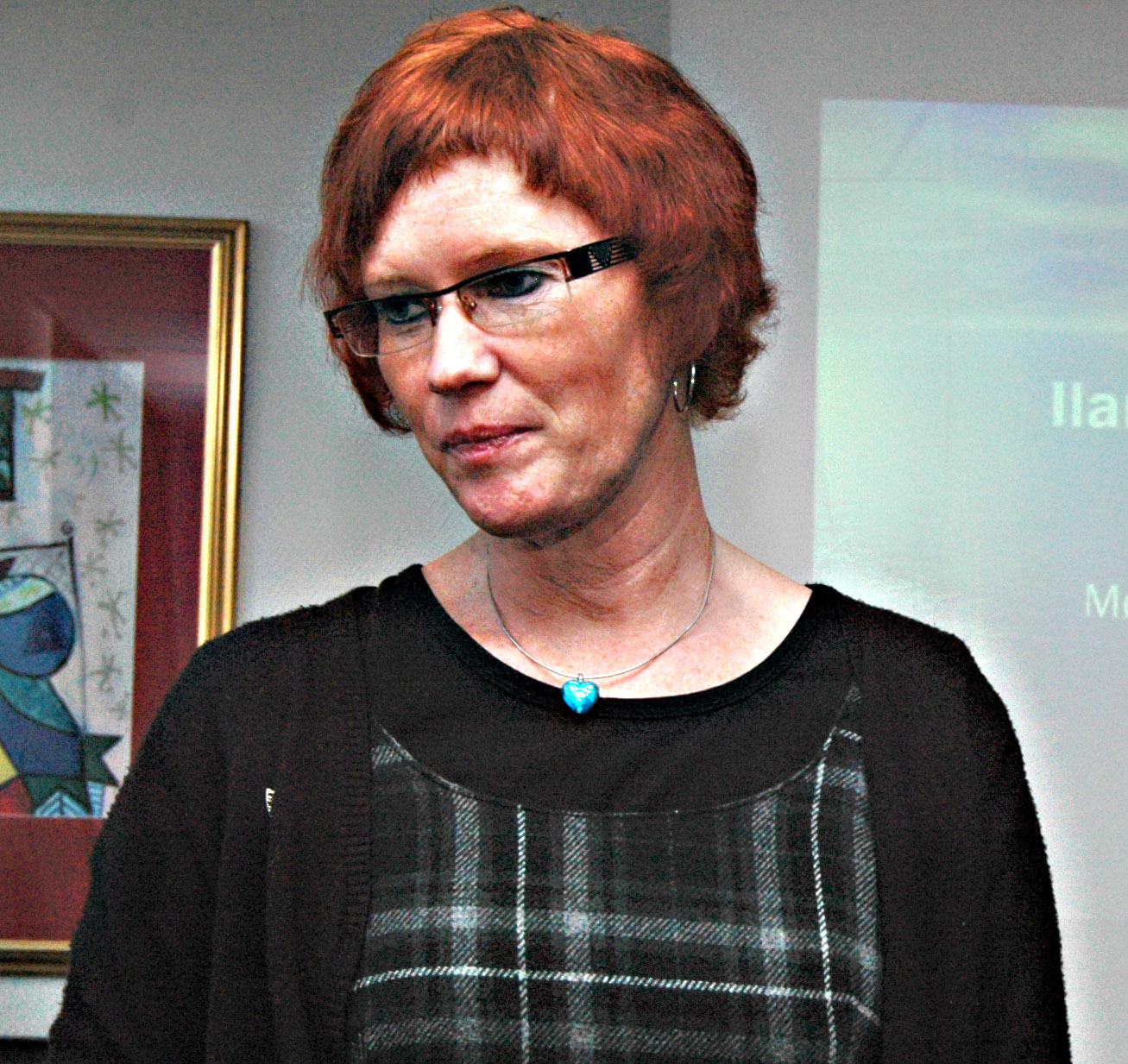 M�te med stortingsbenken 6.november 2009 Rica Hell, Stj�rdal Ordf�rer Karin S�raunet, Vikna, presenterte om Ytre Namdal gassutvalg og ilandf�ring til Lauv�ya.